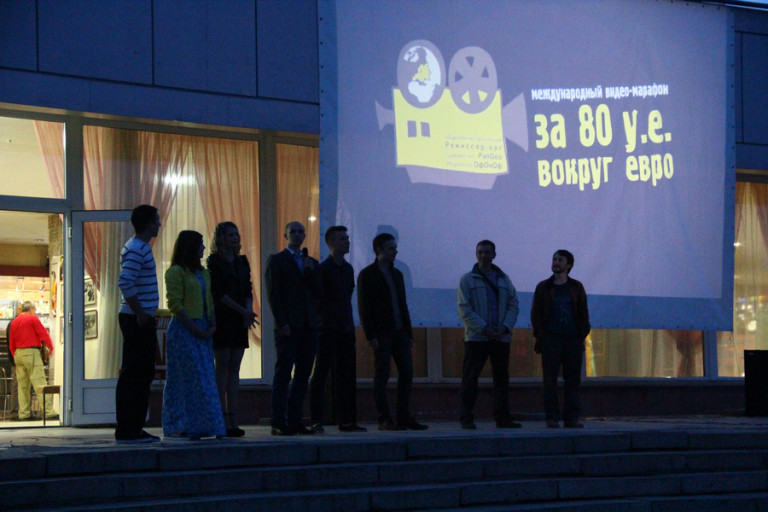 Победители 1 этапа и организаторы Международного виде-марафона "За 80 у.е. вокруг Евро" на финальном показе